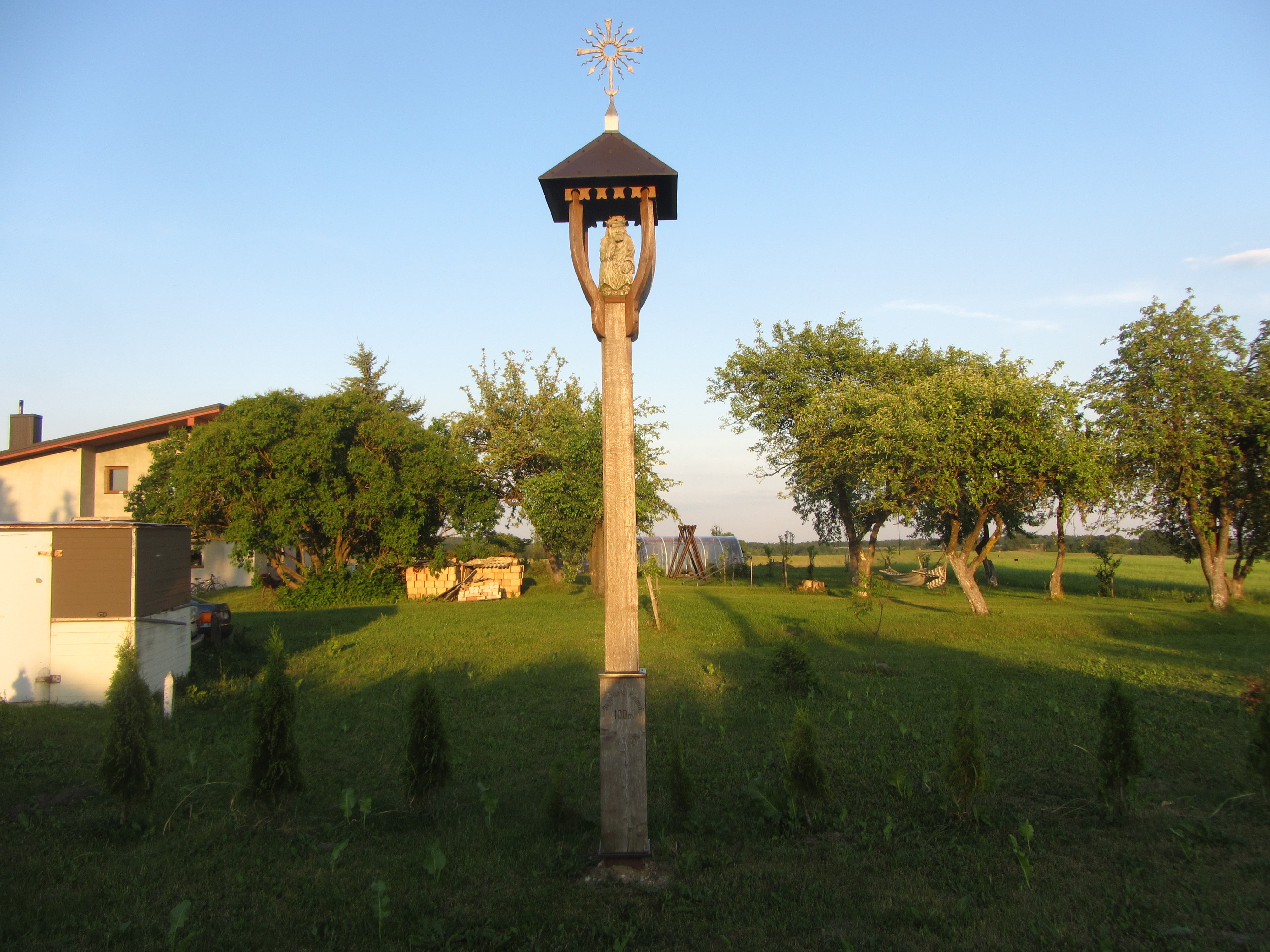 Švobiškės 64118, Lithuania